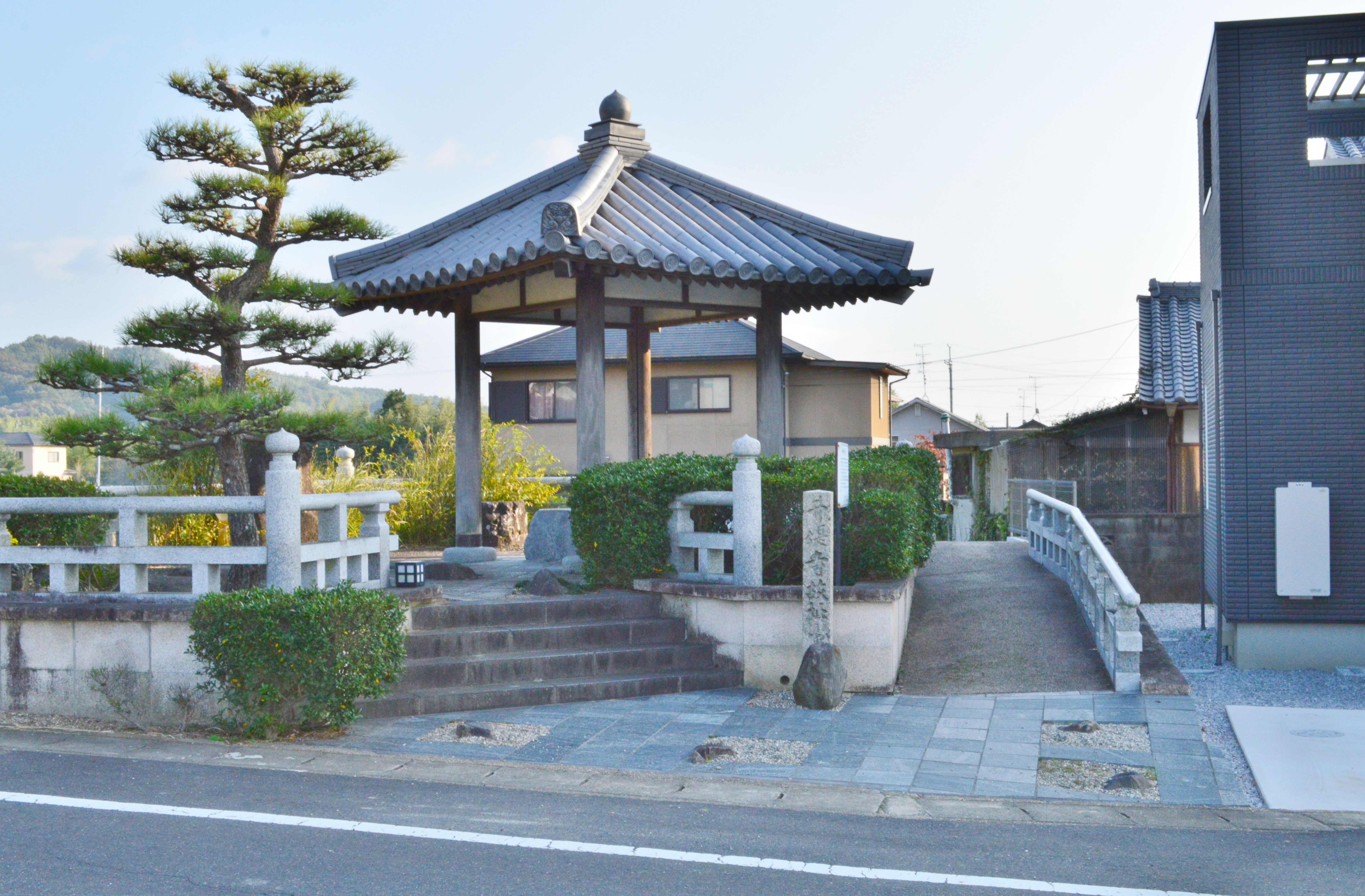 井手寺跡 東屋と石碑